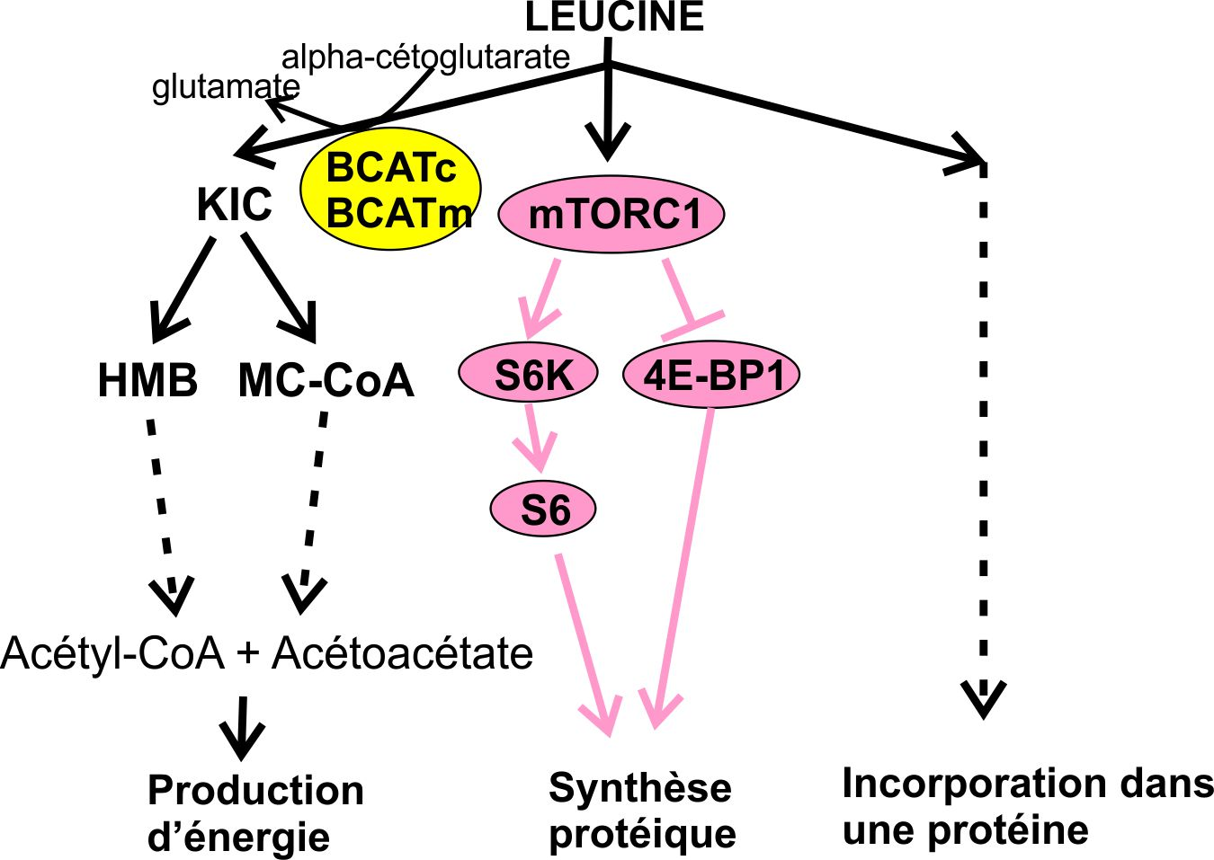 Figure inspirée de Ananieva et al. Leucine metabolism in T cell activation : mTOR signaling and beyond, Adv Nutr 2016 1) BCATc et BCATm catabolisent les premières étapes de la dégradation de la leucine. HMB bêta-hydroxy-bêta-methylbutarate, KIC ketoisocaproate 2) le complexe mTORC1 phosphoryle S6K et 4E-BP1 3) incorporation dans une protéine